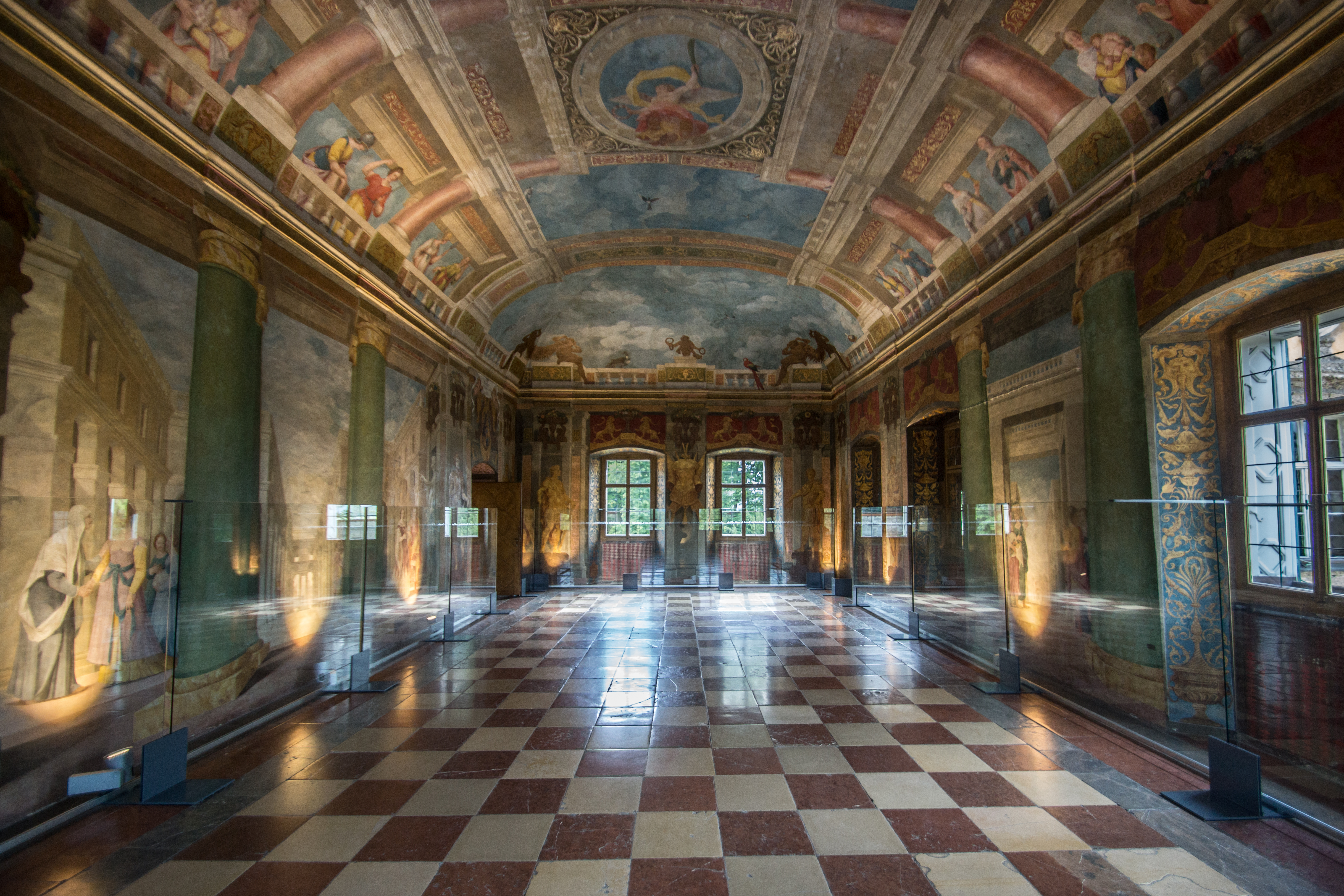 Schlossanlage Hellbrunn, Gesamtanlage samt Gartenbaudenkmalen